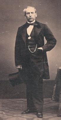 Retrato del almirante español Guillermo Chacón Maldonado (1813-1899).